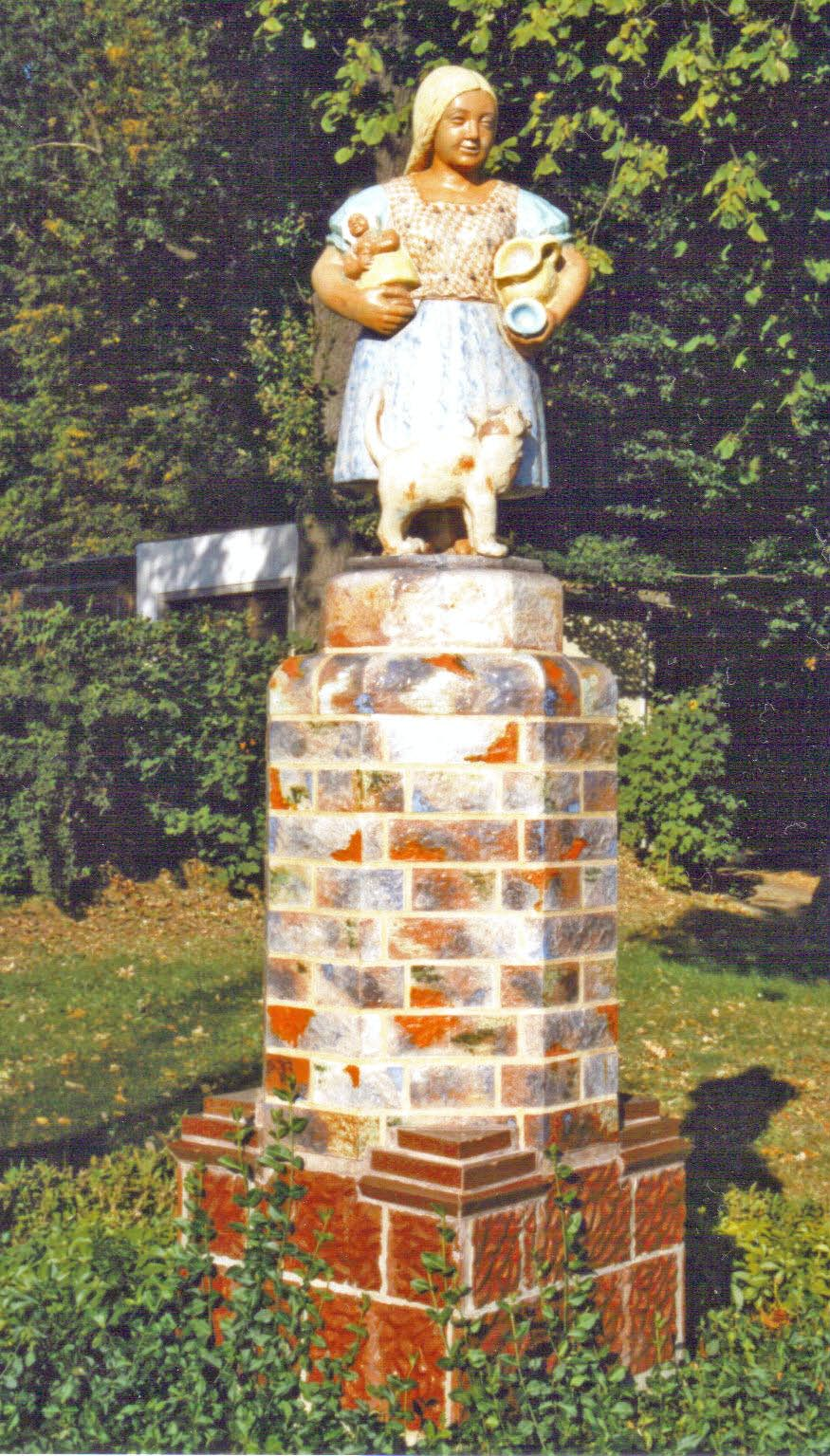 Töpfermädchen von Kurt Feuerriegel in Frohburg (Sa.)